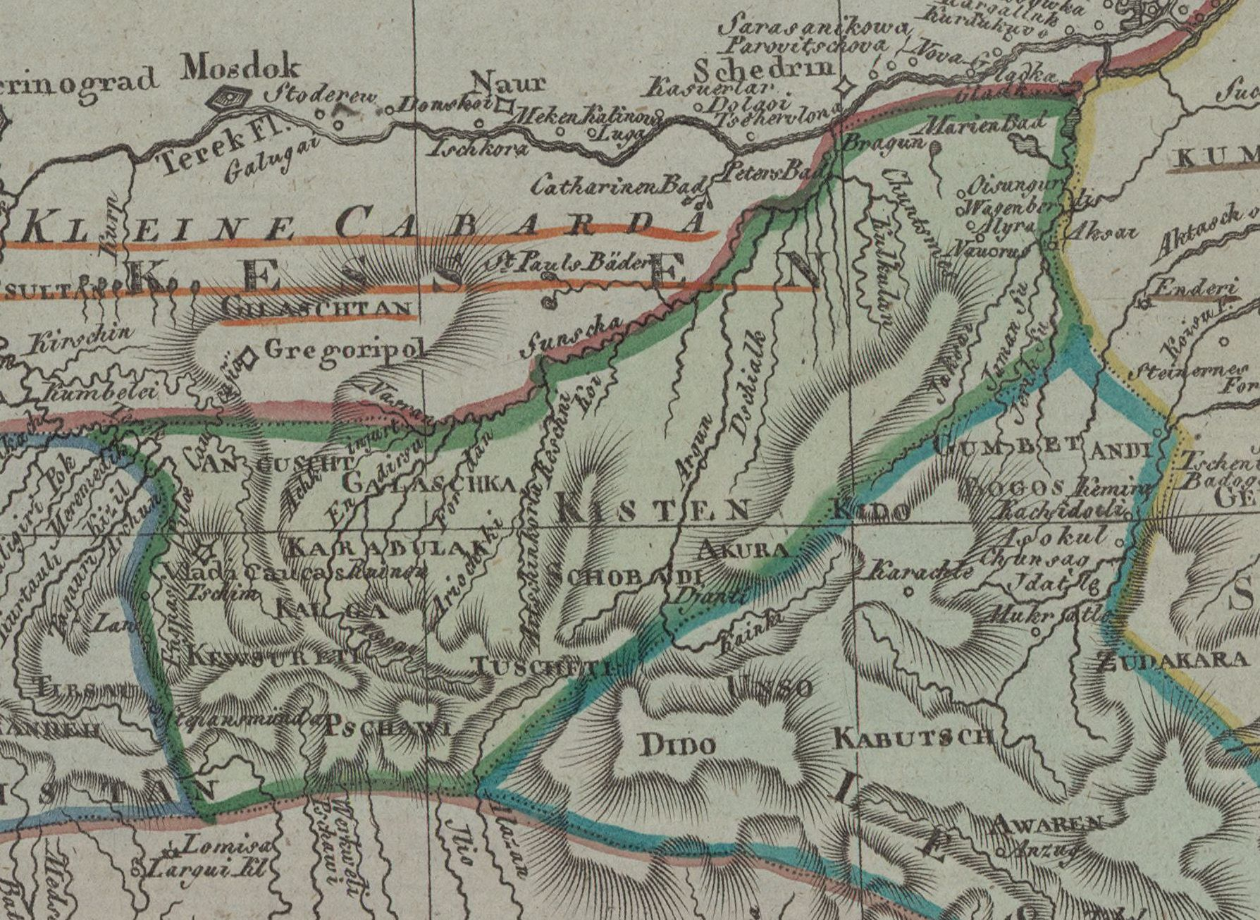 Charte von Laender am Caucasus nach den besten vorhand Charten, Reisen und Astronomischen Ortsbestimmungen / gegeichnet von I.C.M. Reinecke